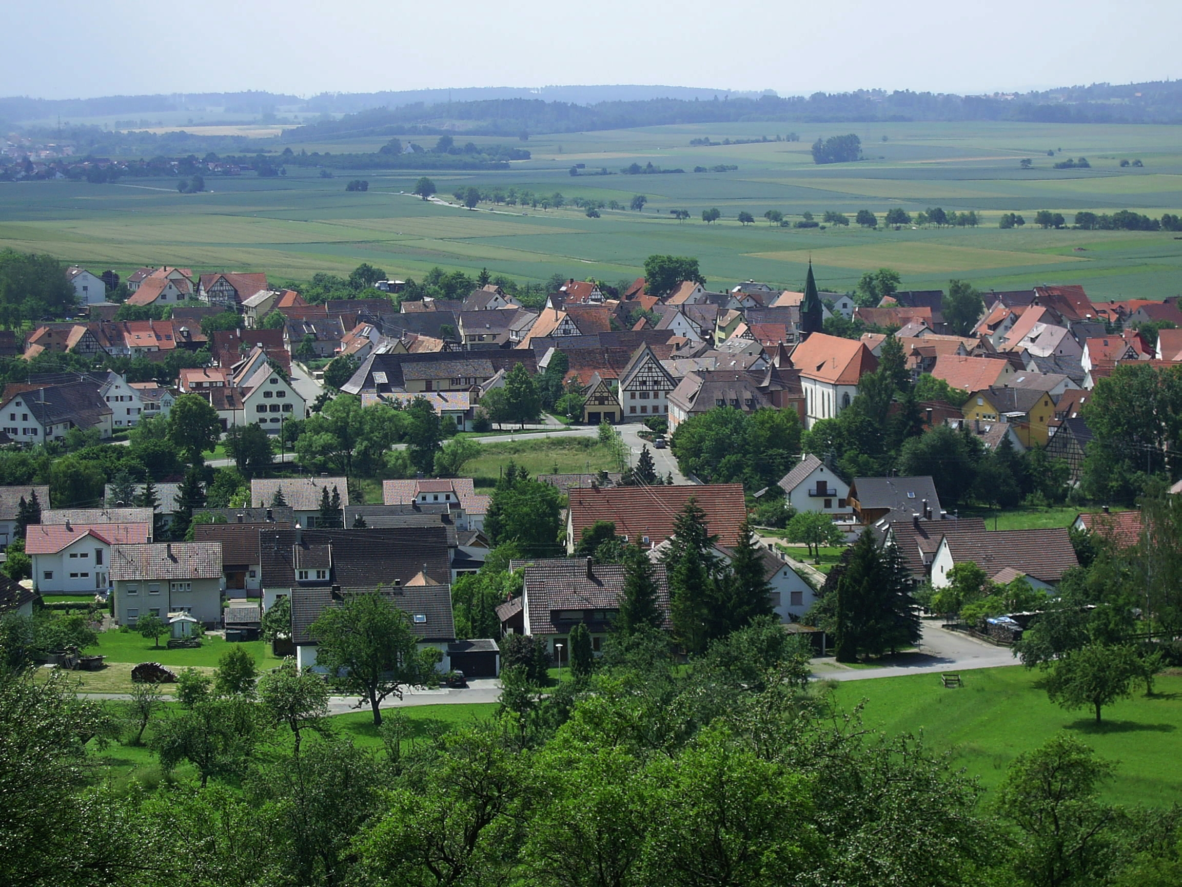 Blick vom Waldrand des Rammert auf Hemmendorf